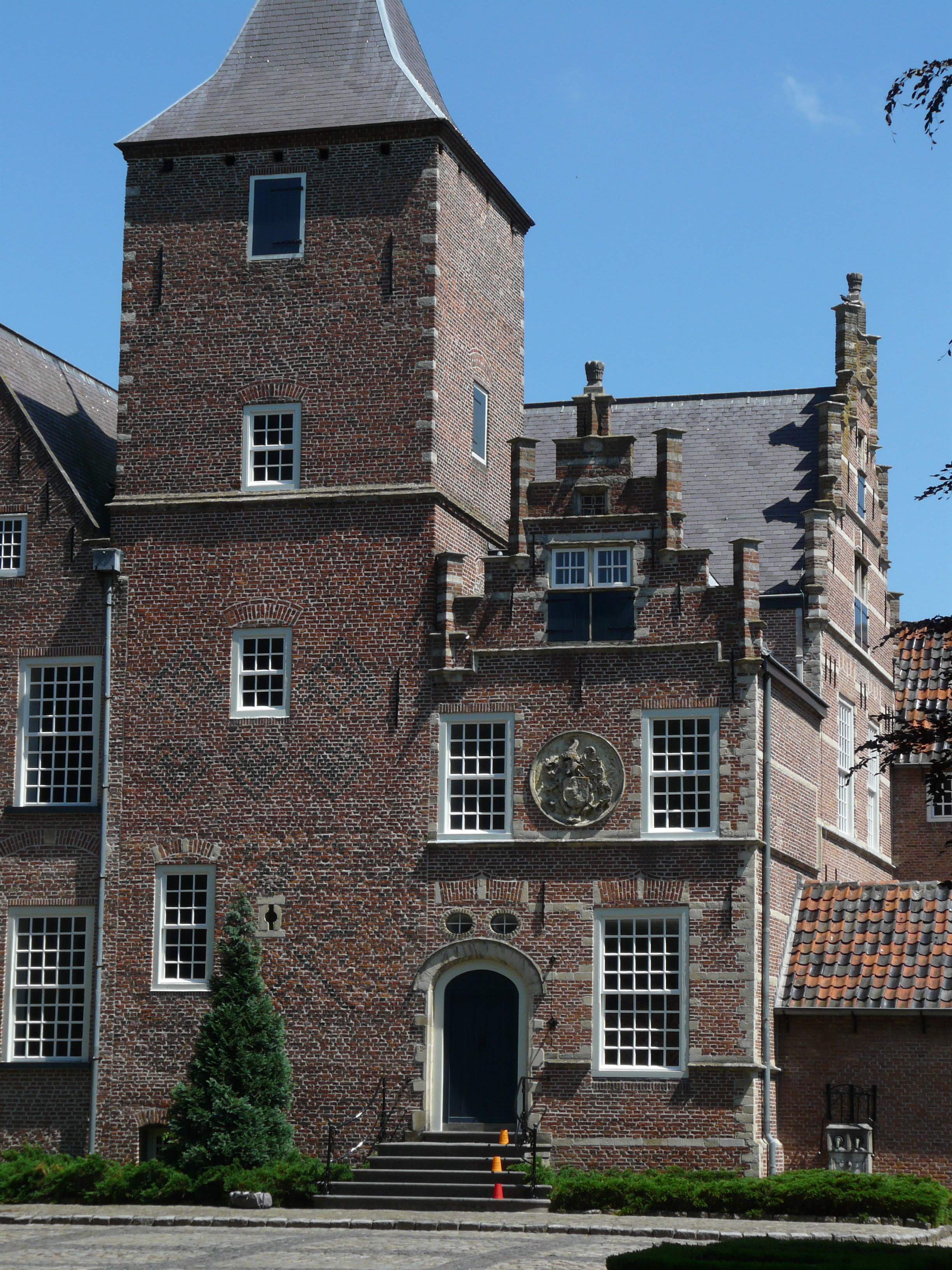 Zicht op deel van klooster Catharinendaal. Voorheen De Blauwe Camer in Oosterhout